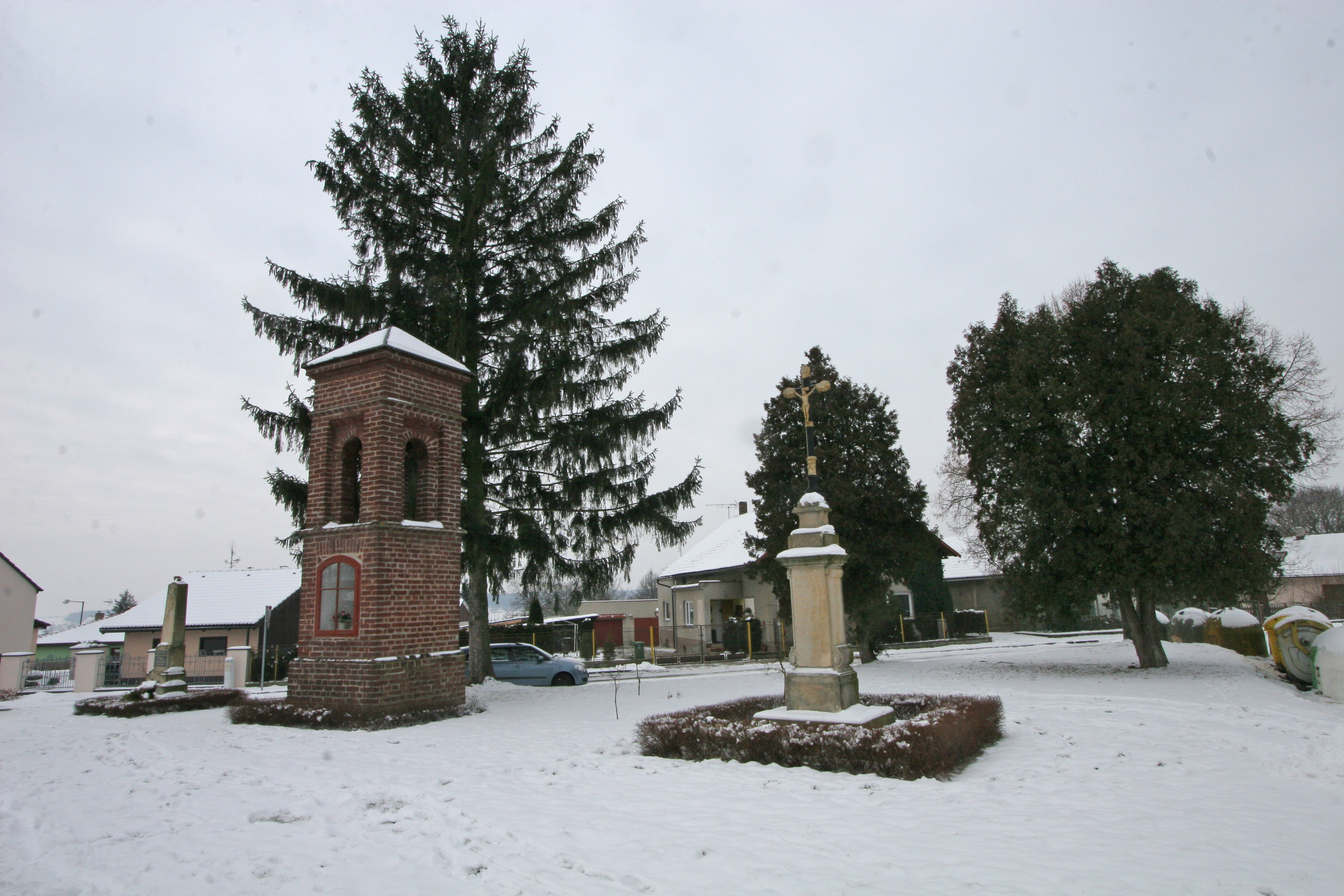 Osičky - zvonička a křížek na návsi